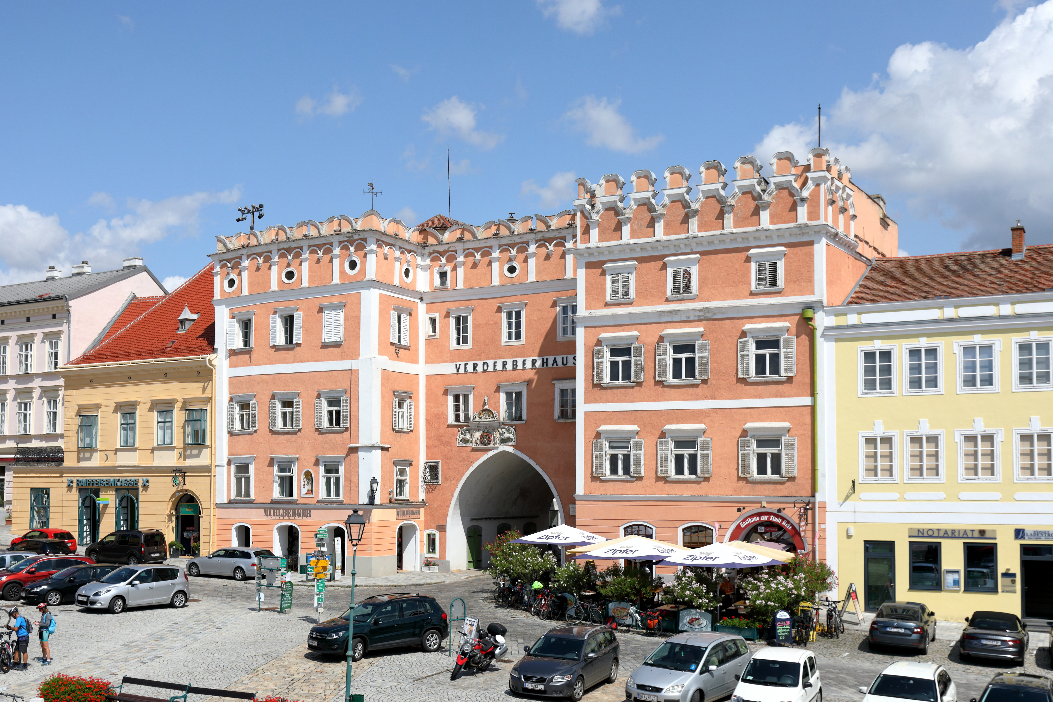 Das Verderberhaus in der niederösterreichischen Stadtgemeinde Retz.Ein mehrteiliger, zinnenbekrönter Gebäudekomplex im venezianischen Renaissancestil aus dem 16. Jahrhundert am Hauptplatz mit den Hausnummern 2 und 34. Benannt ist das Gebäude nach den „Verderberbrüdern“, zugezogene Kaufleute aus dem heutigen Slowenien.